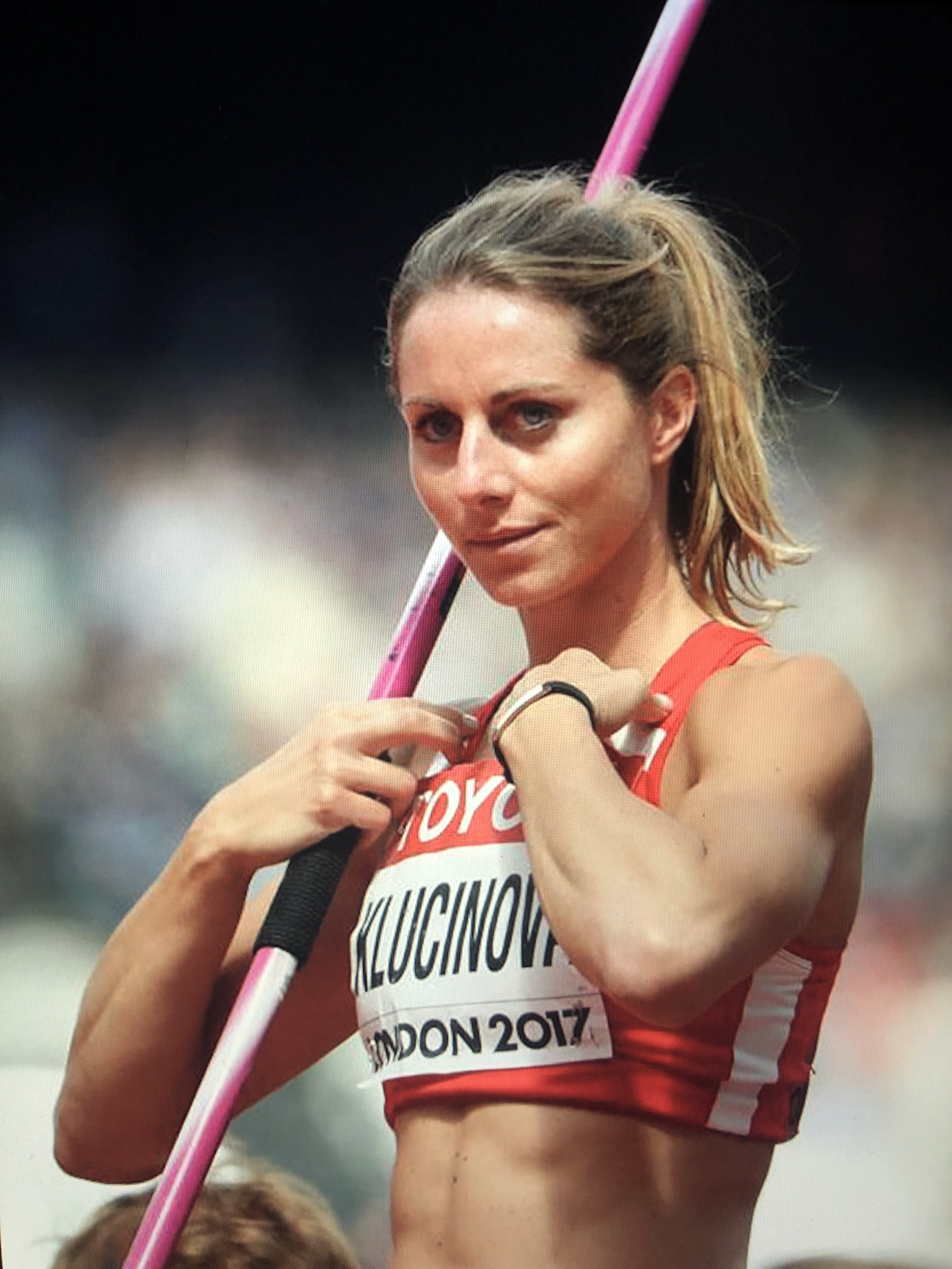 eliska klucinova se bud pekelne soustredi na hod ostepem nebo vidi v dalce jidlo